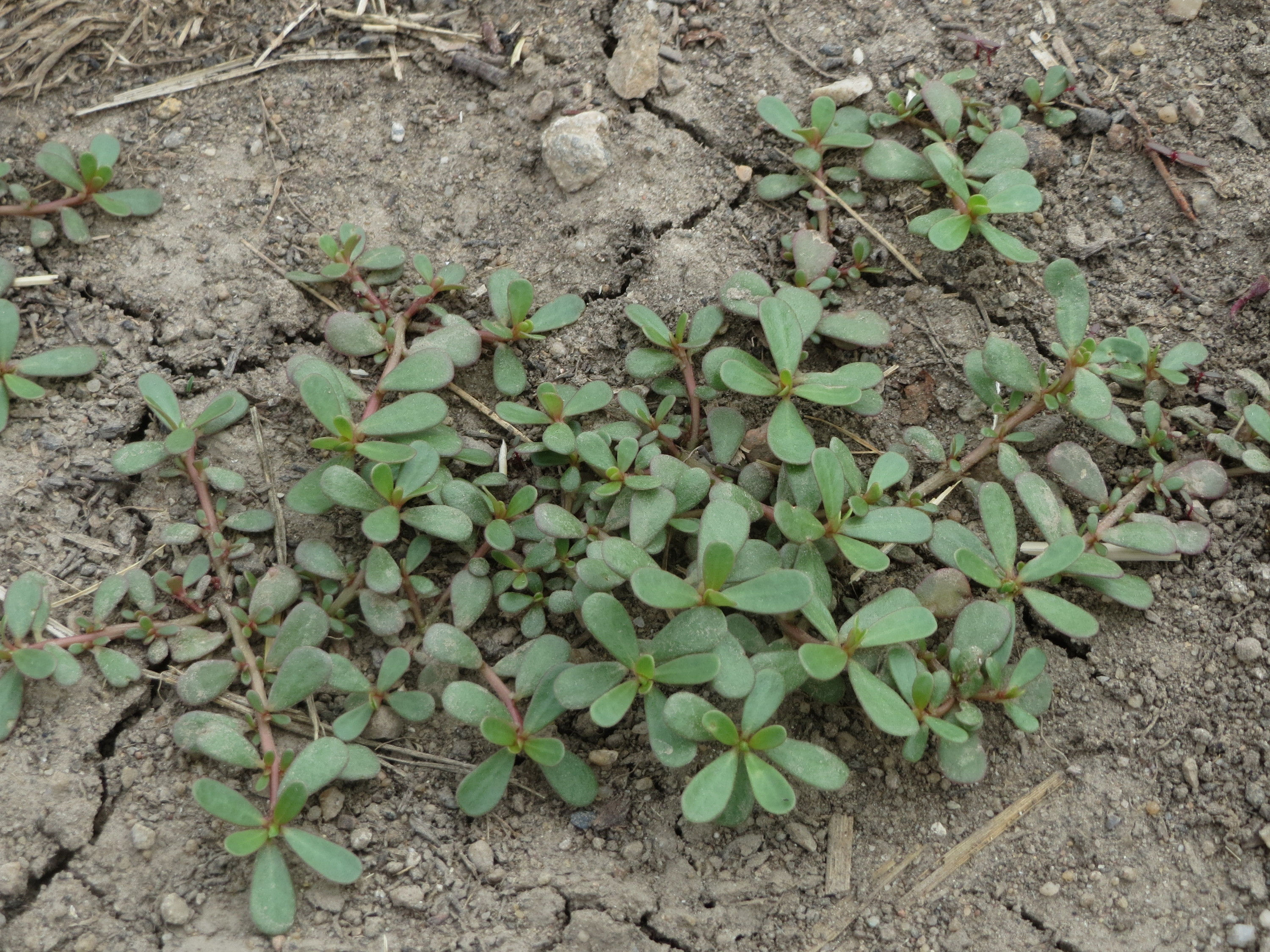 Portulak (Portulaca oleracea) an der Elisabethenstraße bei Wiesbaden